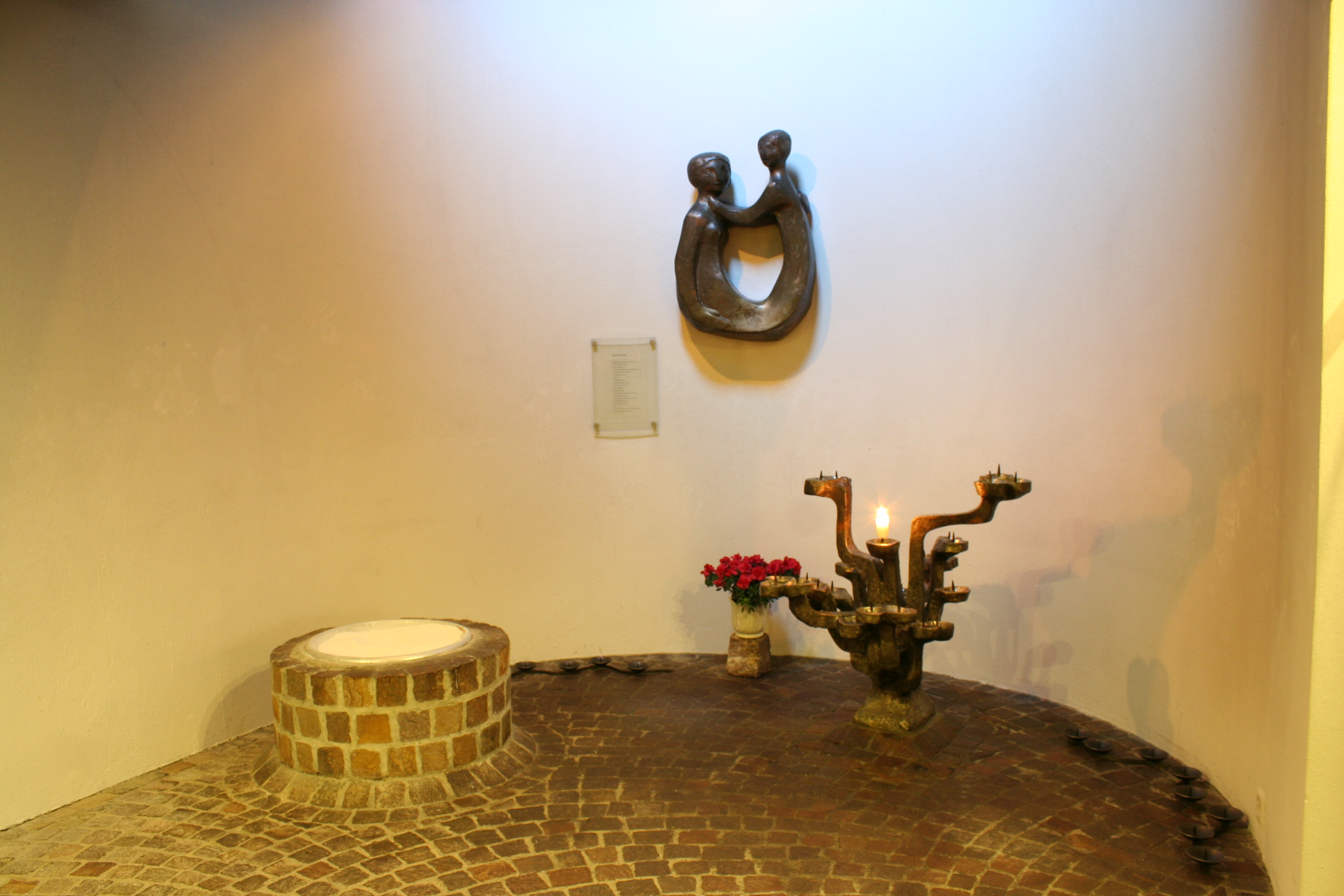 Römisch-katholische Pfarrkirche Christkönig Kloten, Andachtsnische